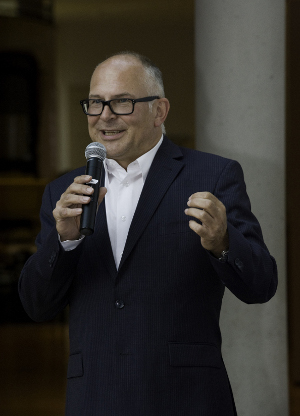 Helmut Gold im Juni 2012